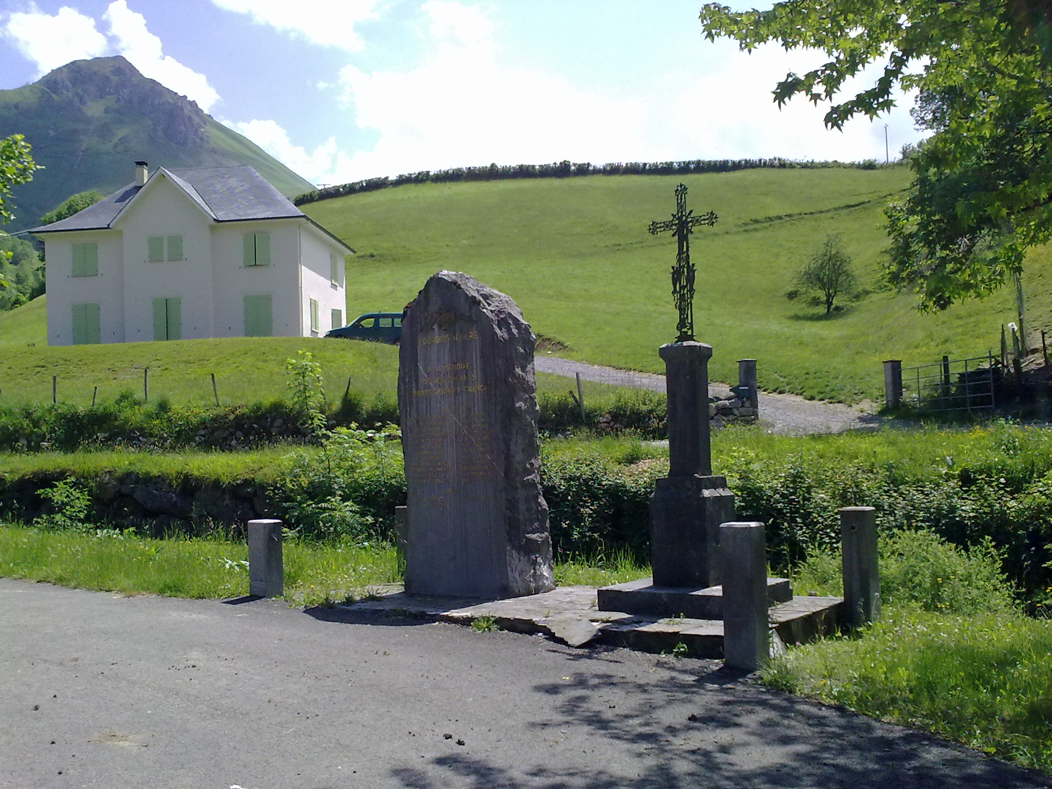 Lourdios-Ichère, France, le 23 mai 2010.